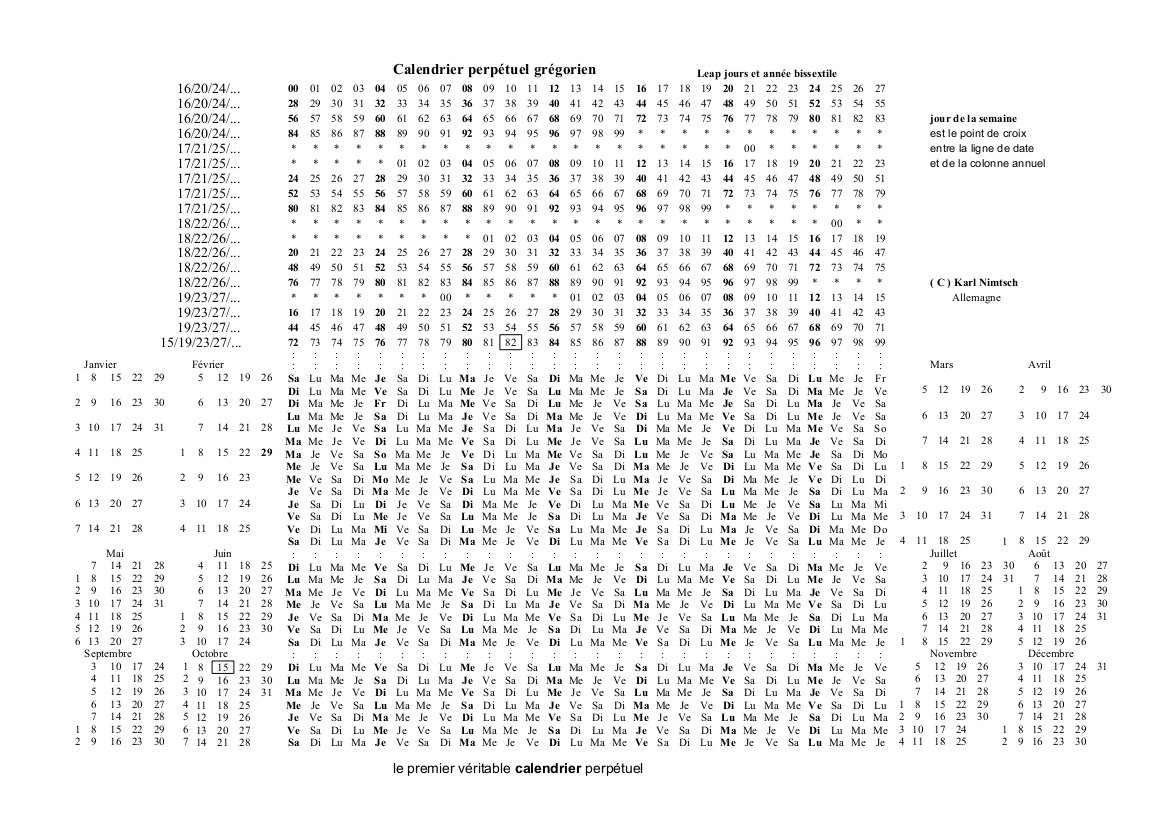 Kalender mit Anzeige der Wochentage ohne Berechnung (mit Kontrollmöglichkeit)